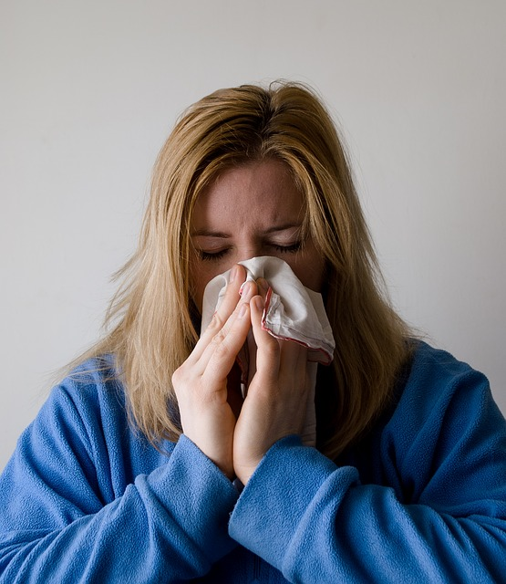 Kada pelud uđe u organizam javljaju se neugodni simptomi poput kihanje, svrbeža nosa i očiju i šmrcanja.